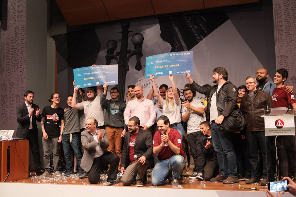 premiação hack in sampa police neto